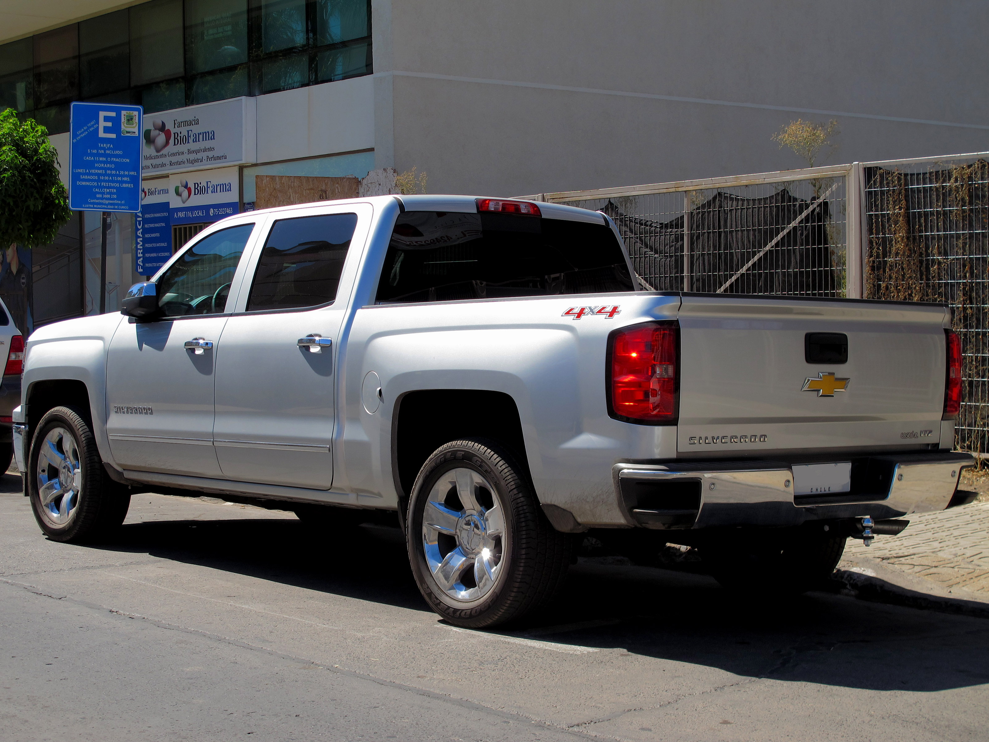 Chevrolet Silverado LTZ Crew Cab 4x4 2015